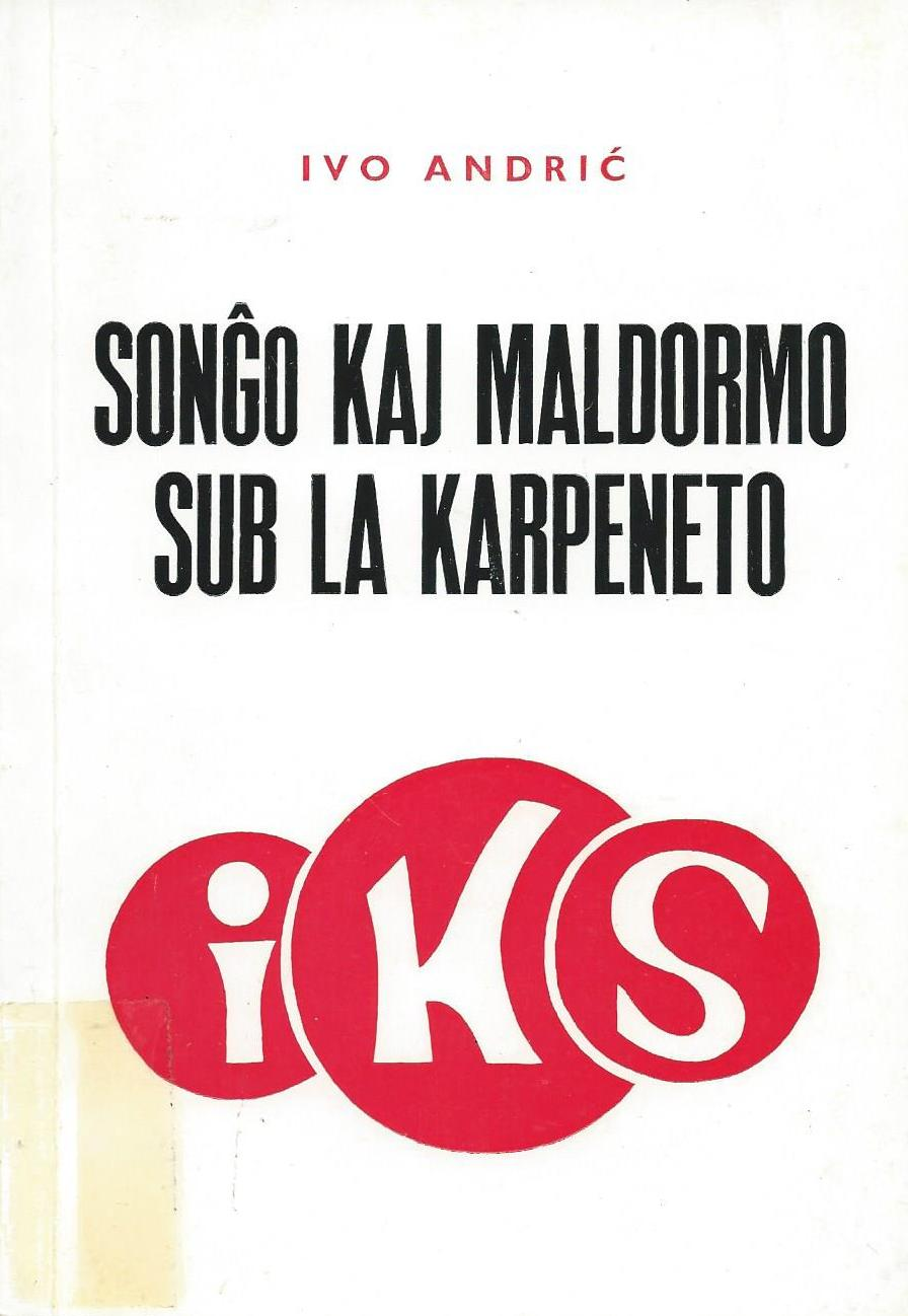 librokovrilo de libro "Songo kaj Maldormo sub la Karpeneto", 1972